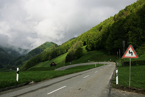 Passwangstrasse bei Oberbeinwil